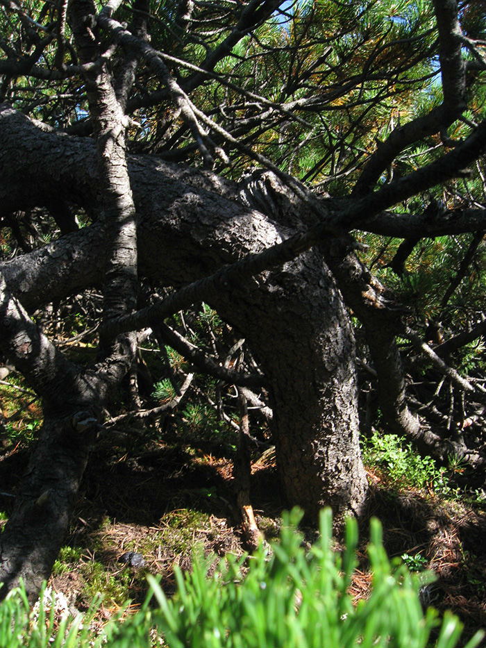 гірська сосна аршиця